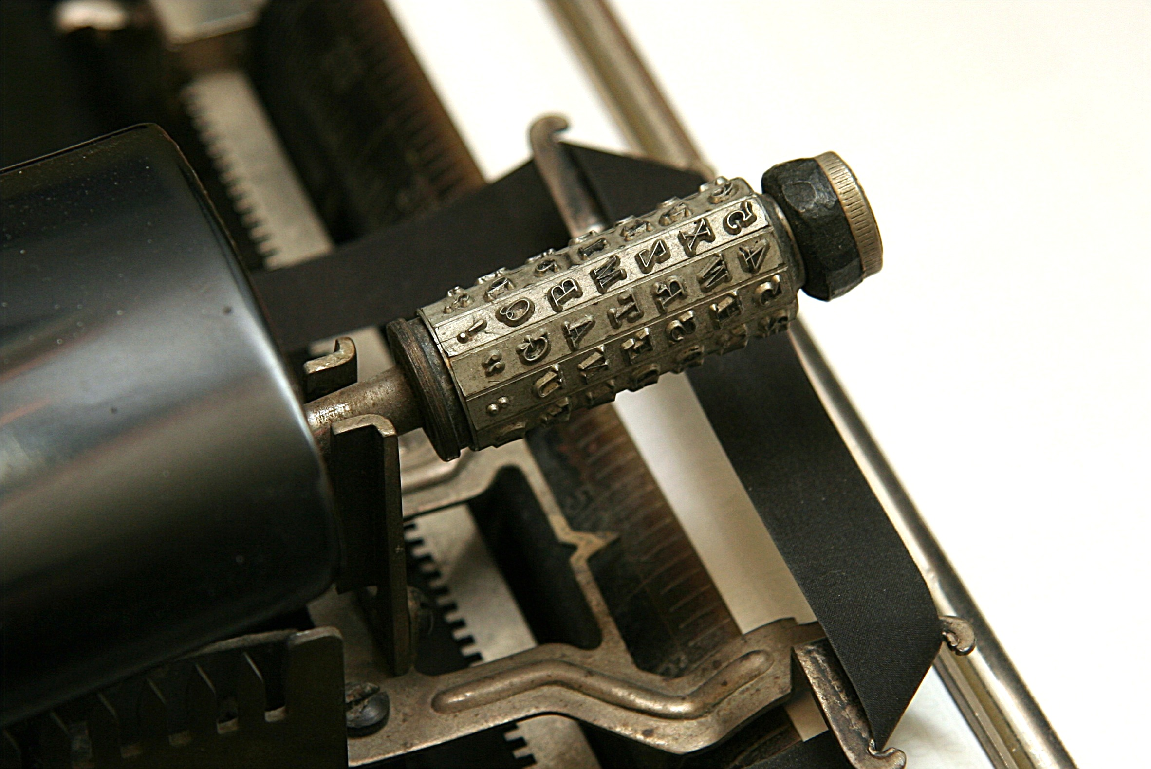 Typenzylinder einer Mignon Modell 4, Baujahr 1924